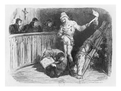 Illustration de Gustave Doré pour le Essais de Montaigne "De la présemption"